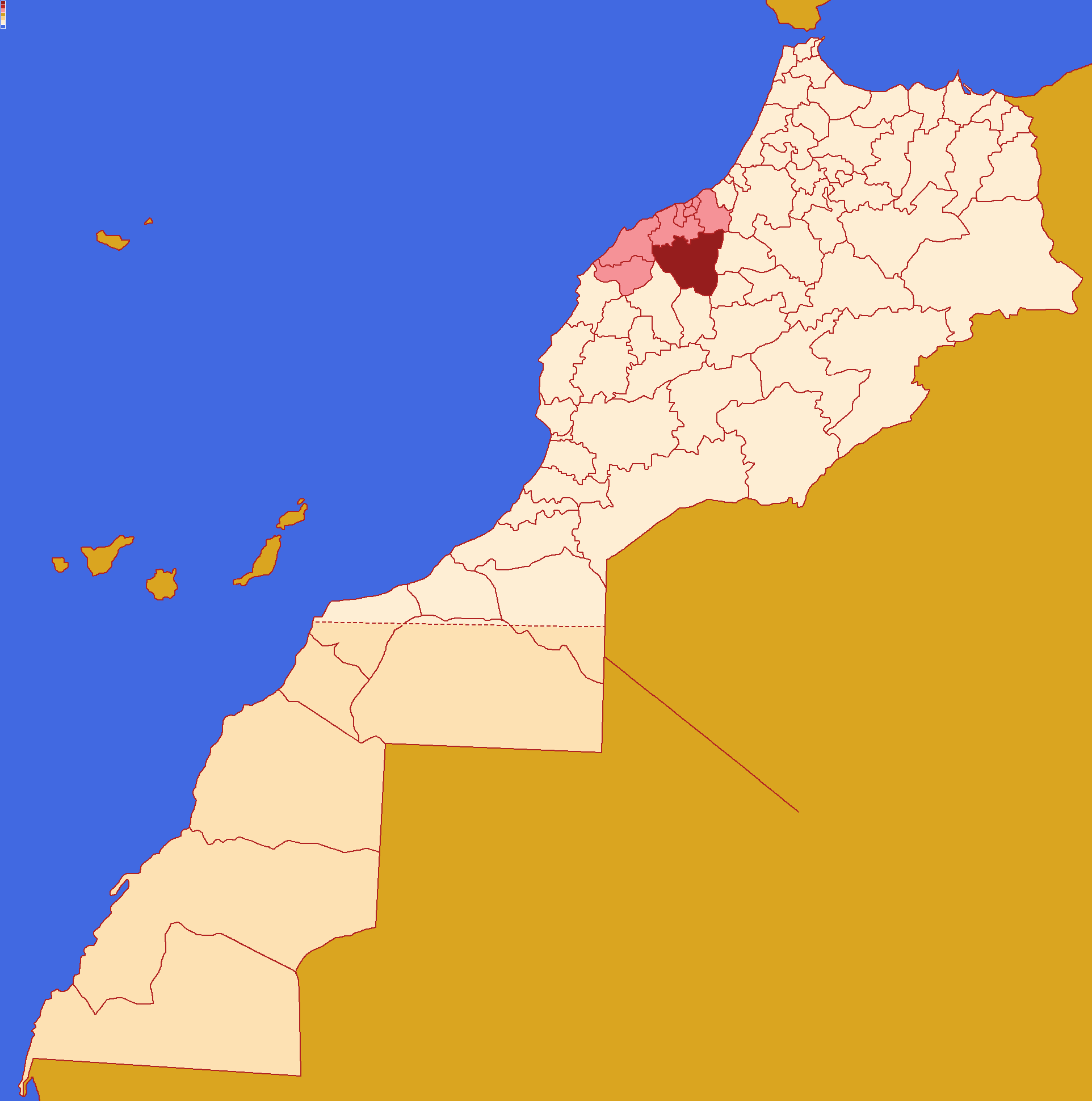 Localização da província de Settat , dentro da região de Casablanca-Settat e dentro de Marrocos. Conforme a reforma administrativa de 2015.